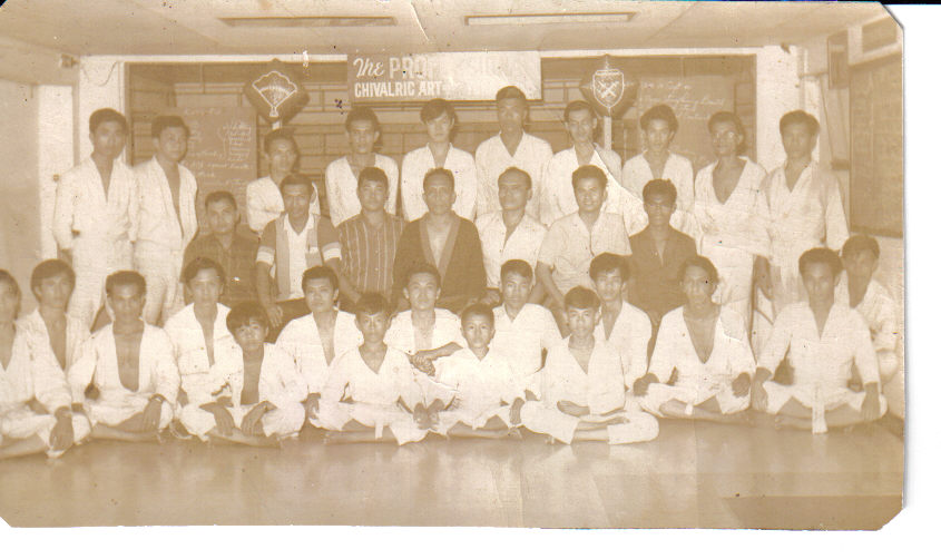 Description = Grand Master Angel L. Blancia avec ses étudiants Doce Pares Arnis Eskrima. Source = fille Gloria Blancia Thirnish Date = dans les années 1970 author = Angel L. Blancia Permission = épouse Monserrat G. Blancia, son époux est Angel L. Blancia